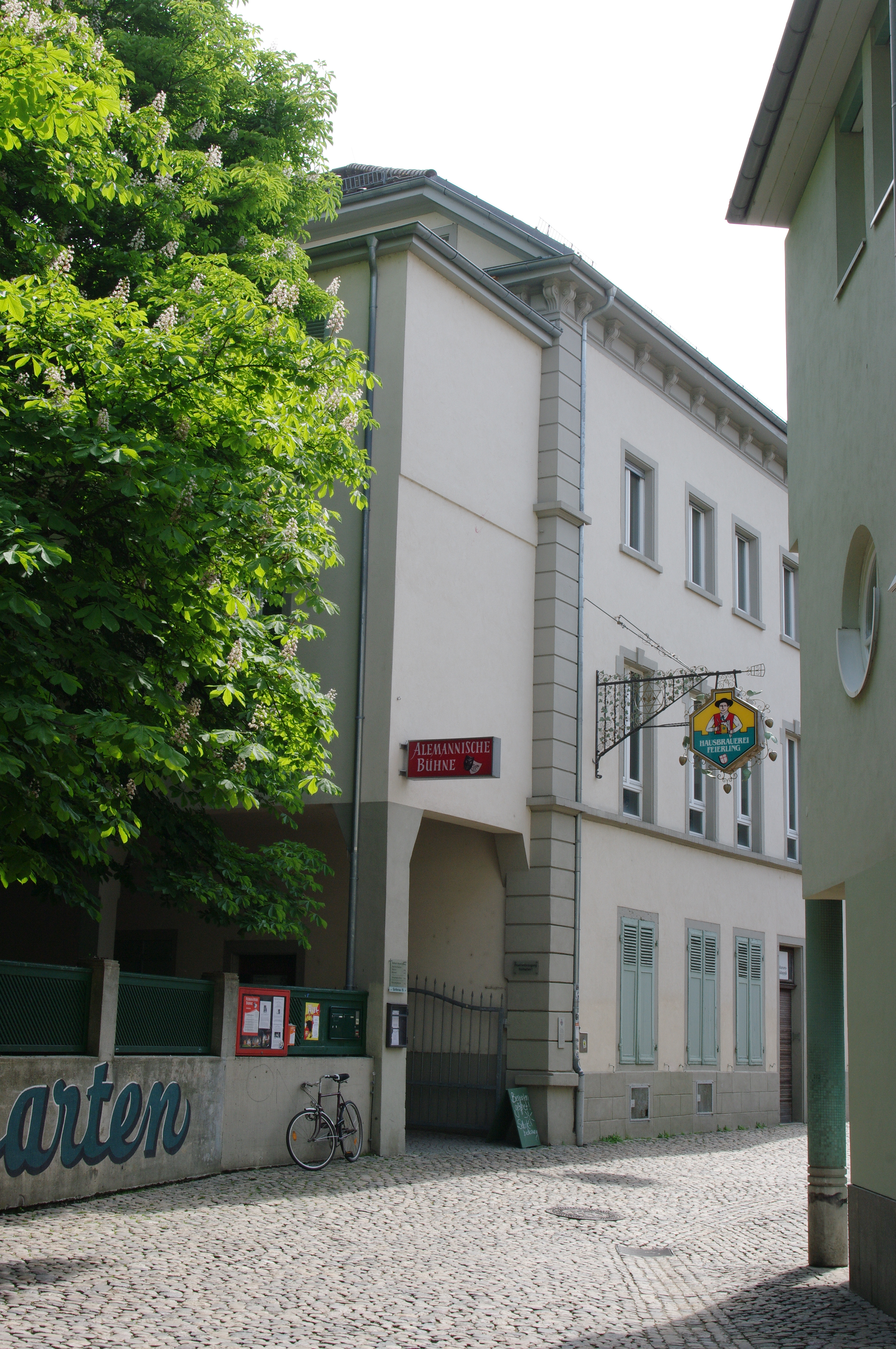 Der Eingang zur Alemannischen Bühne in Freiburg